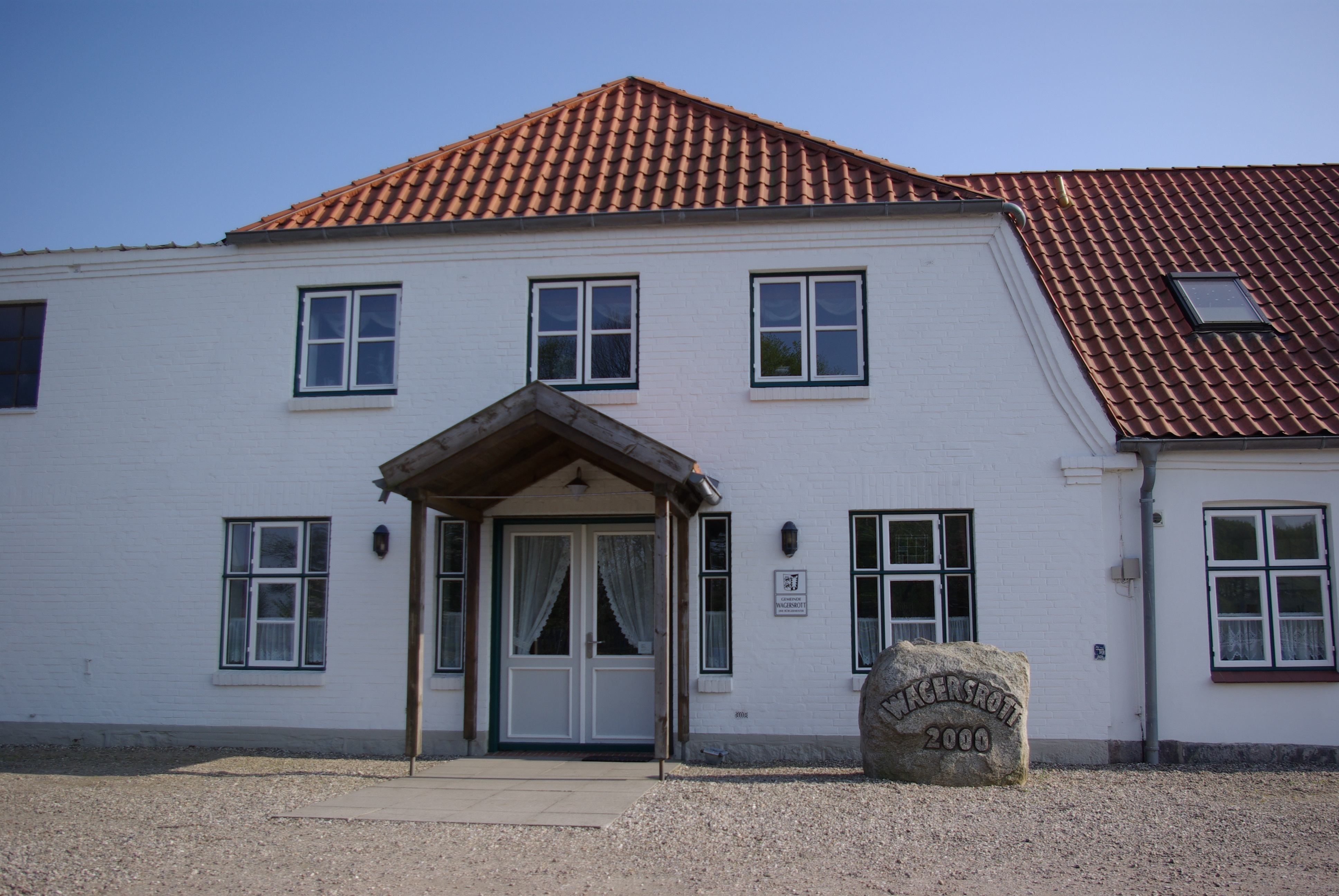 Wagersrott in Schleswig-Holstein. Das Bild zeigt den Sitz des Bürgermeisters von Wagersrott.